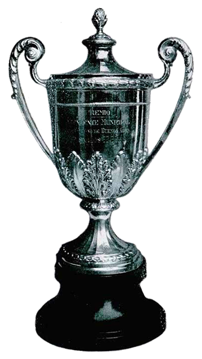 La Copa Intendente Municipal Ciudad de Buenos Aires que se le otorgaba a los que salían subcampeones en el Campeonato Argentino Interligas de fútbol disputado entre 1920 y 1989.